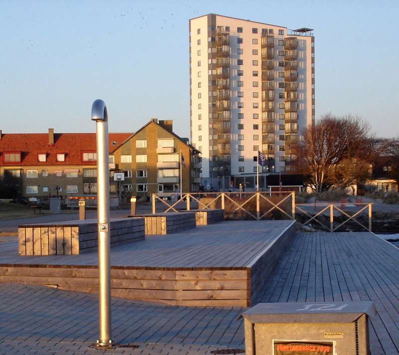 Höghuset med nya bryggan framför